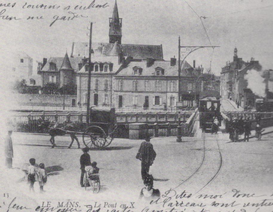 Le pont en X au début du XXème siècle.